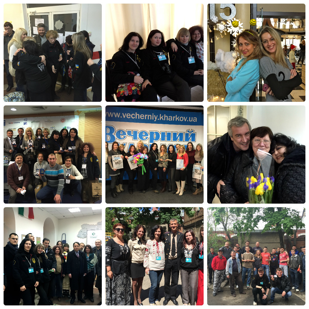 «Станція Харків»: волонтерське життя